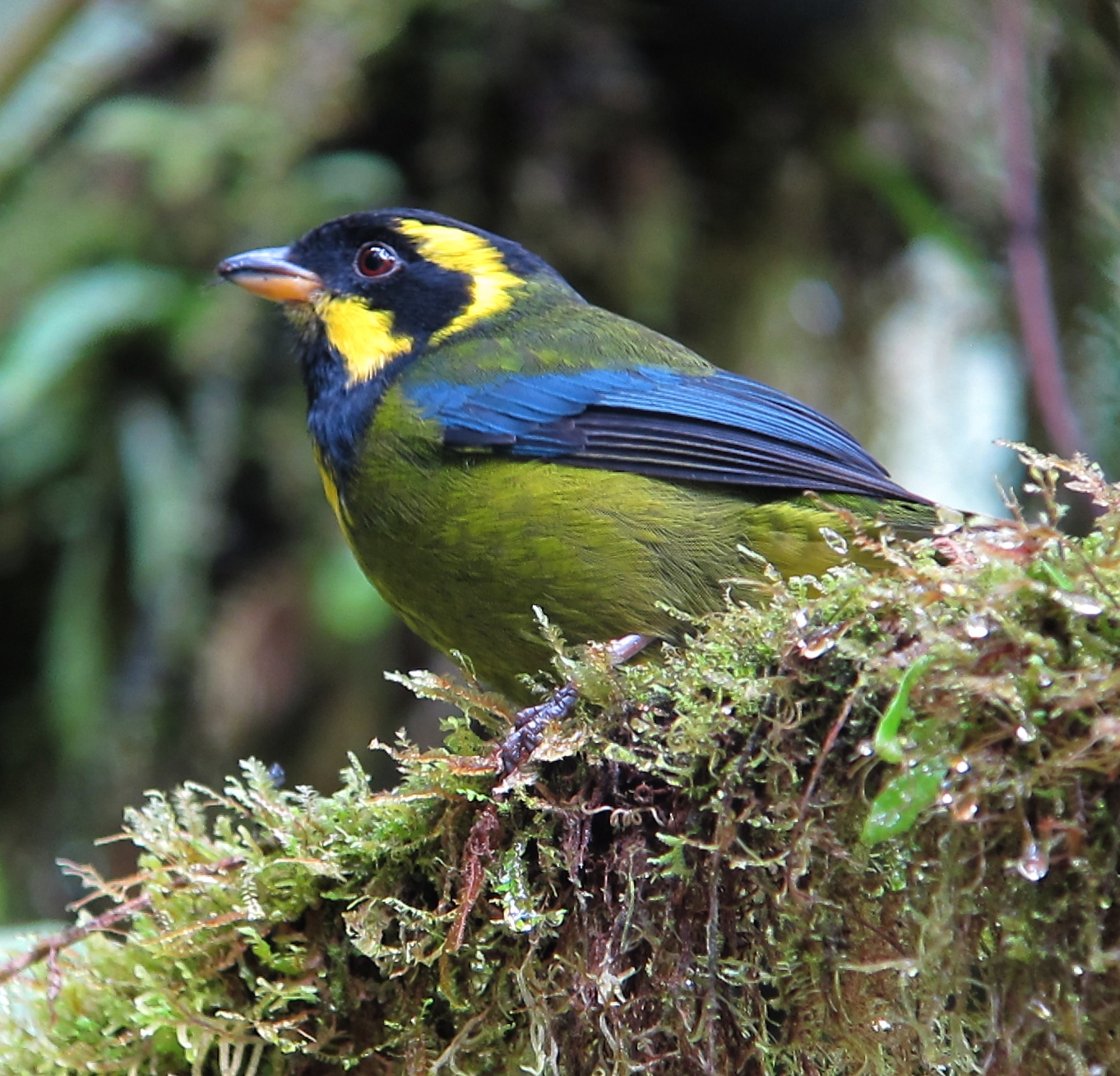 Pueblo Rico, Risaralda, Colombia ( Cerro Montezuma)